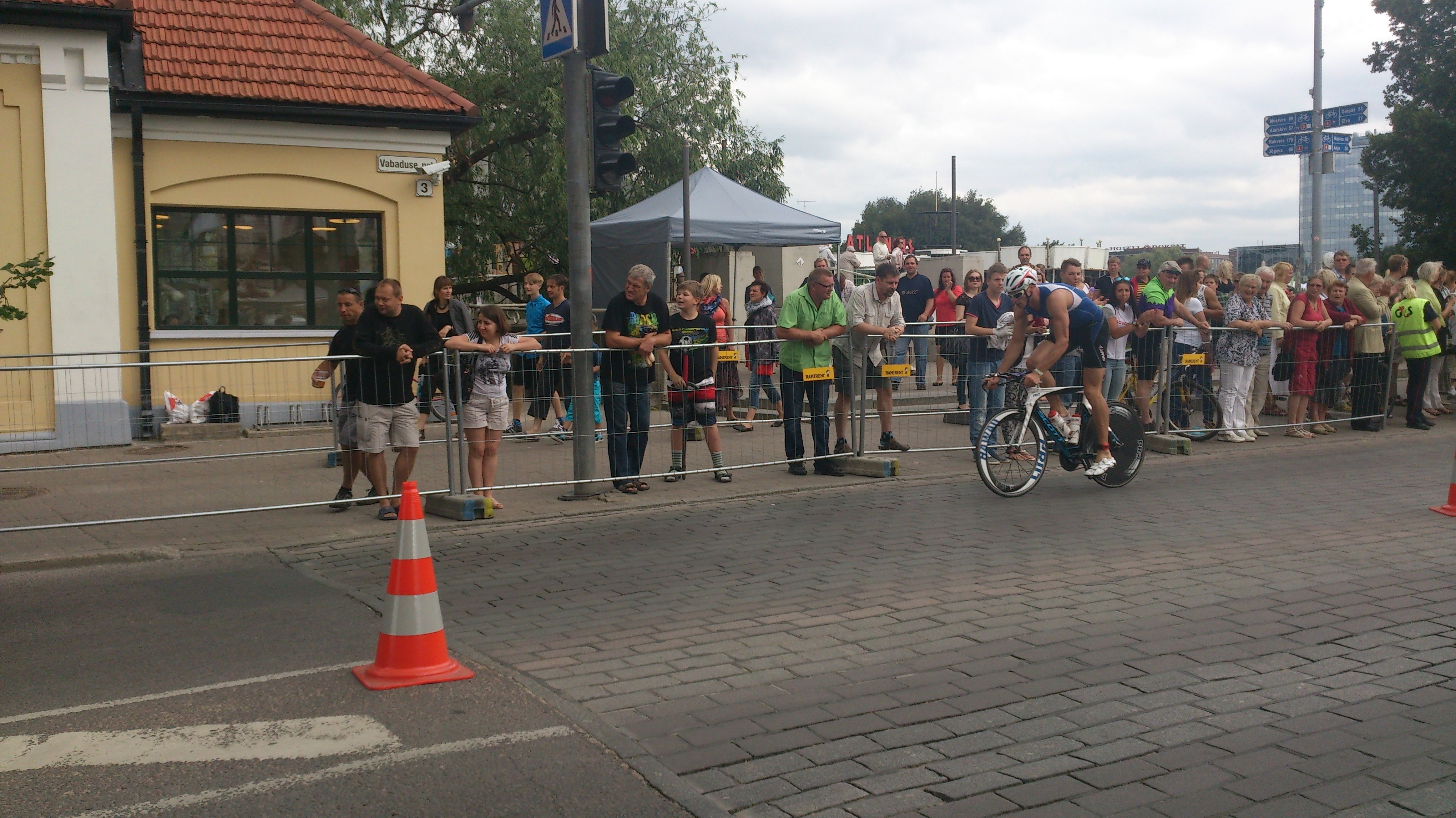 Priit Ailt (nr. 2)[1] sõitmas jalgrattaga Vabaduse puiesteel Tartu Mill Triathlonil 2014.a. Tartu Hansapäevade ajal